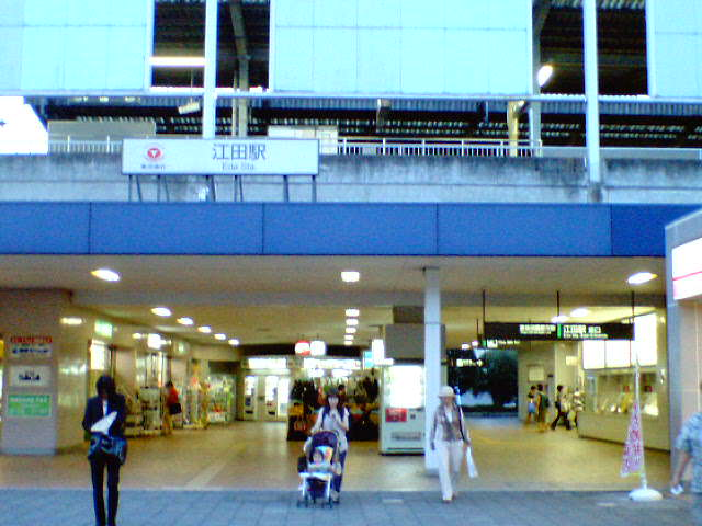 田園都市線江田駅東口 撮影者:Goki 撮影日:2004年8月9日 この画像はGFDLで利用できます。Goki 2004年8月12日 (木) 08:24 (UTC)